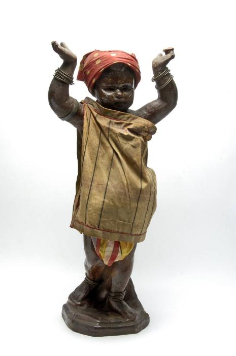 Beeld. Het was een geschenk van de Surinaamse Commissie Tentoonstelling Brussel 1910. Volgens de museumregistratie is dit voorwerp afgeschreven (6-7-1926) en terug ontvangen op 25-12-1961 van de Afdeling Tropische Produkten KIT, voormalig Handelsmuseum. Balata is West-Indische rubber. Vermoedelijk stelt dit beeldje een stadsneger of negerjongen voor die met zijn handen een mand vis op zijn hoofd ondersteund. De mand is losgeraakt. De kleding van het beeld is echter zeer verwarrend en vertoont verschillende culturele invloeden, o.a. de schaamgordel zoals die gedragen wordt door stads- en Bosnegers, maar ook door Indianen en vrouwen van de benedenlandse Indianen, de zogenoemde kamisa. Over de schouder hangt een doek zoals gedragen door Bosnegers, terwijl op het hoofd een doek gedragen wordt als door vrouwen van de stad (Lelyveld, 1919:458; 466). Om de polsen en enkels bevinden zich spiraalvormige ijzeren ringen.. Beeldje van gegoten rubber